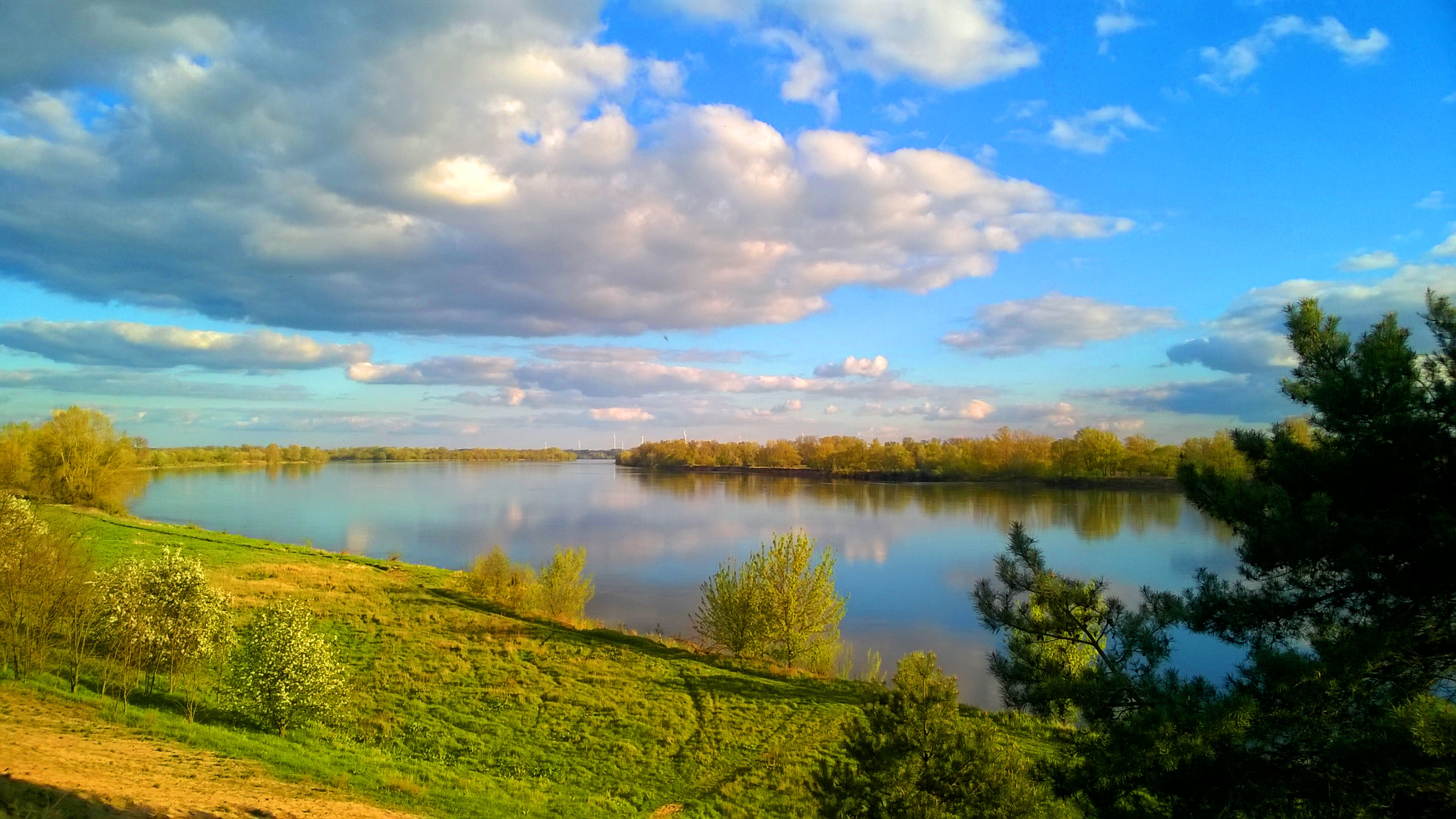 Wisła na wysokości Siarzewa pod Toruniem